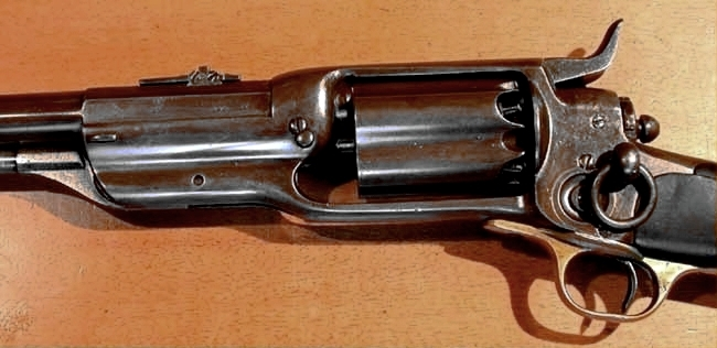 Colt Roots Karabiner